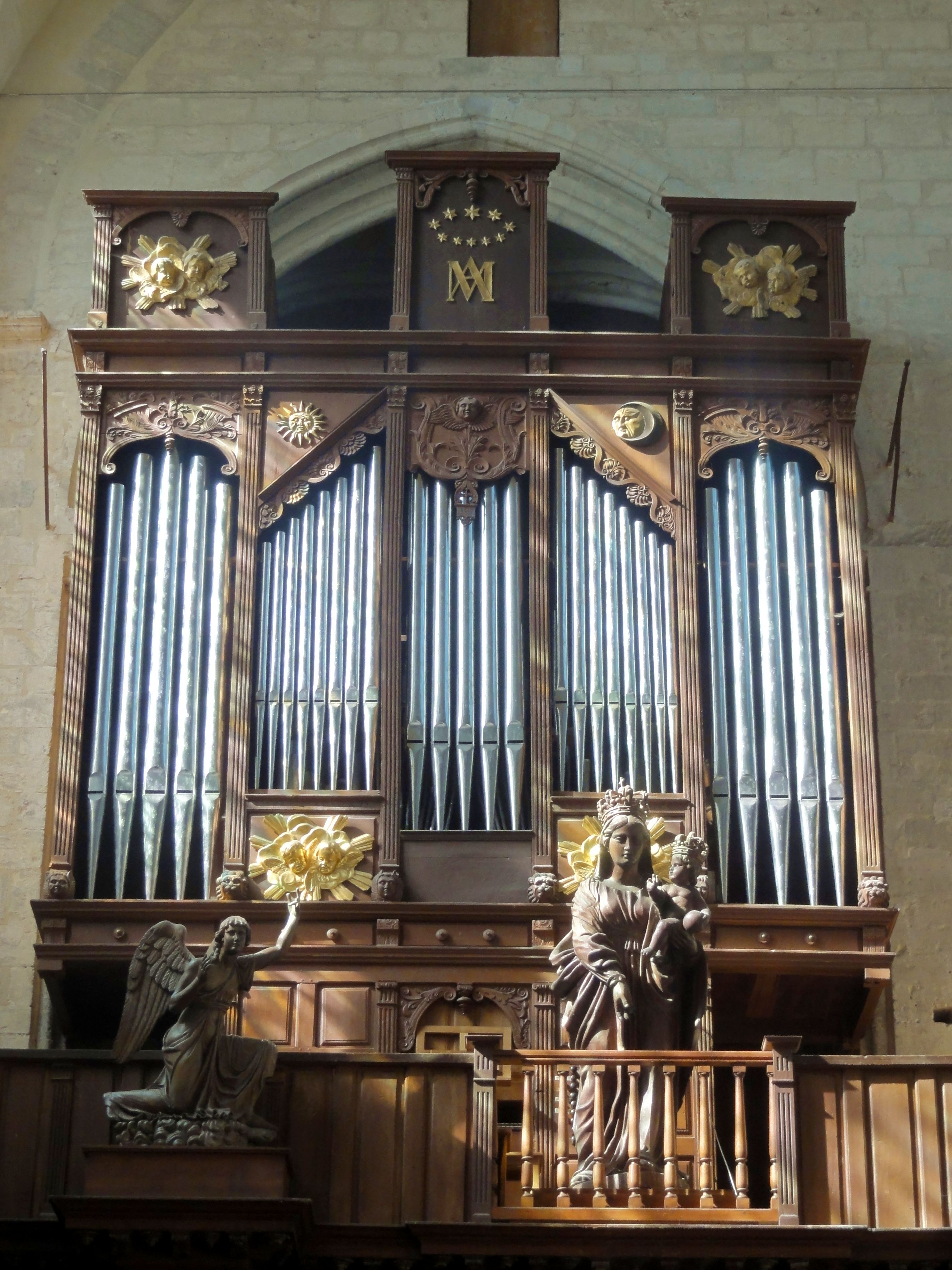 Grand-orgue.